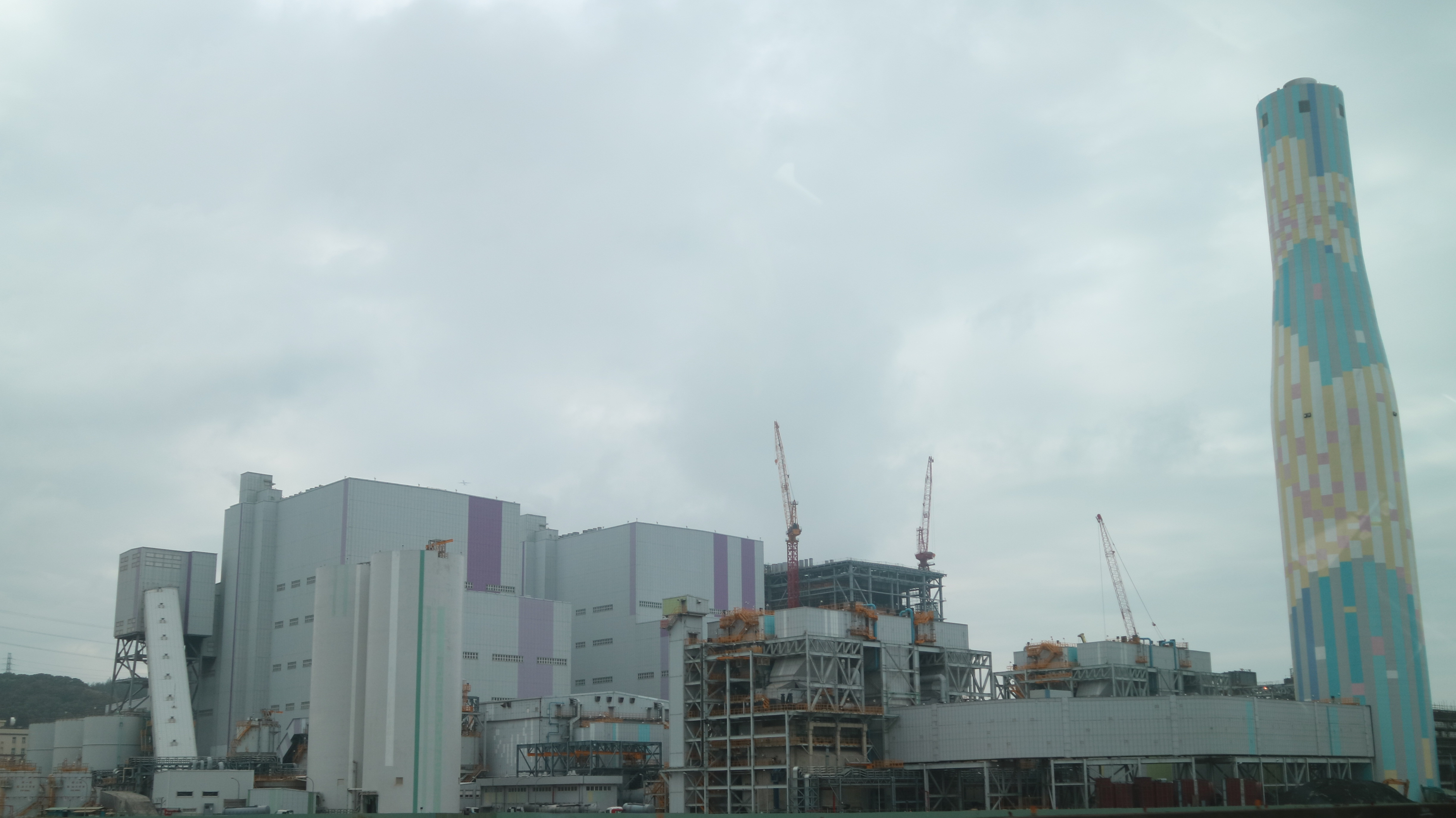 林口發電廠三部超超臨界燃煤發電機組